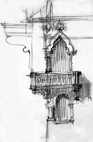 Croquis de balcon. Extrait du Cahier de croquis de Toma T. Socolescu. Nous sommes les descendants et uniques ayant-droits de toute l'oeuvre de Toma T. Socolescu (mort en 1960 à Bucarest).